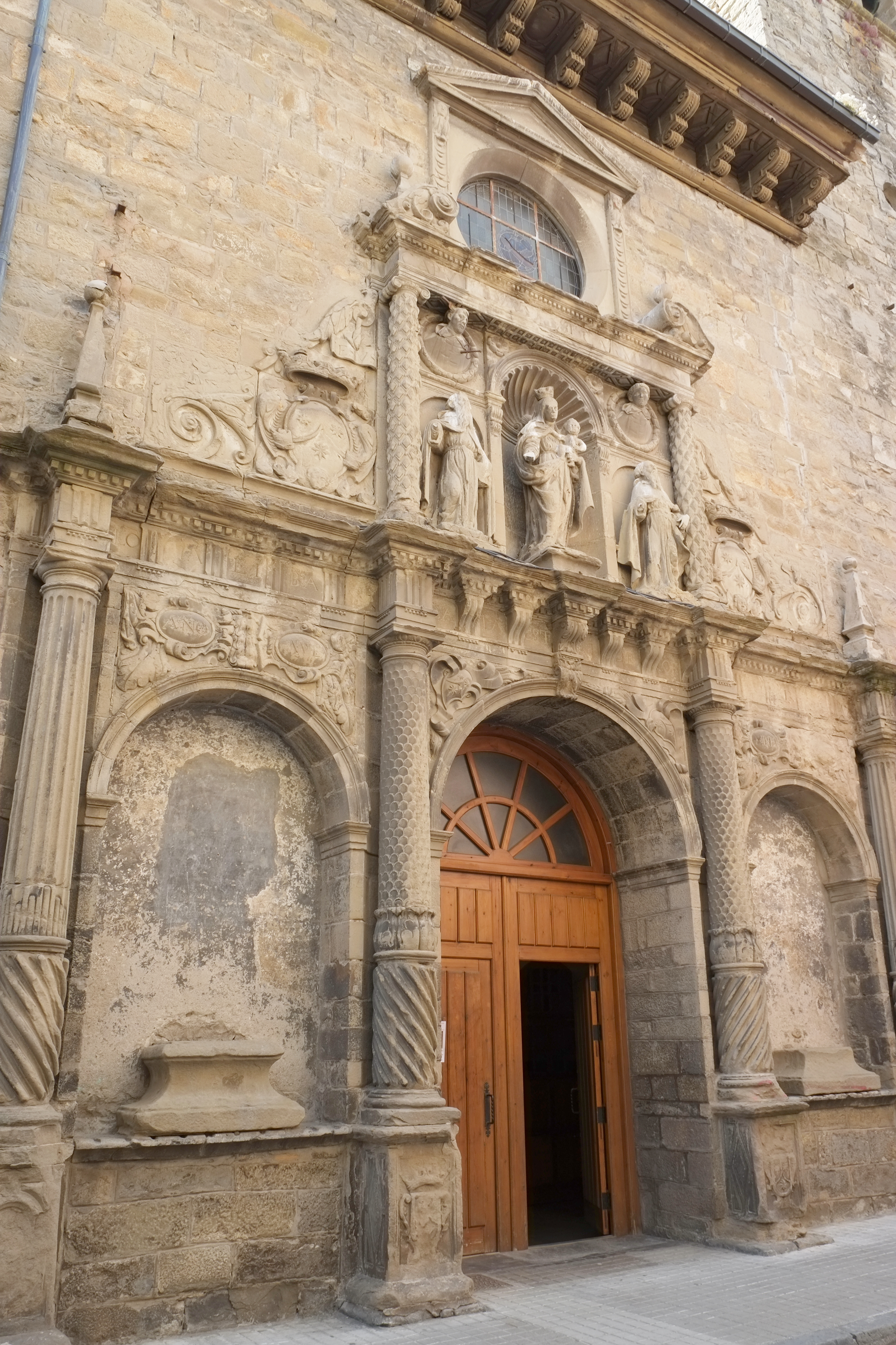 Kirche Nuestra Señora del Carmen in Jaca in der Provinz Huesca in Aragonien (Spanien)